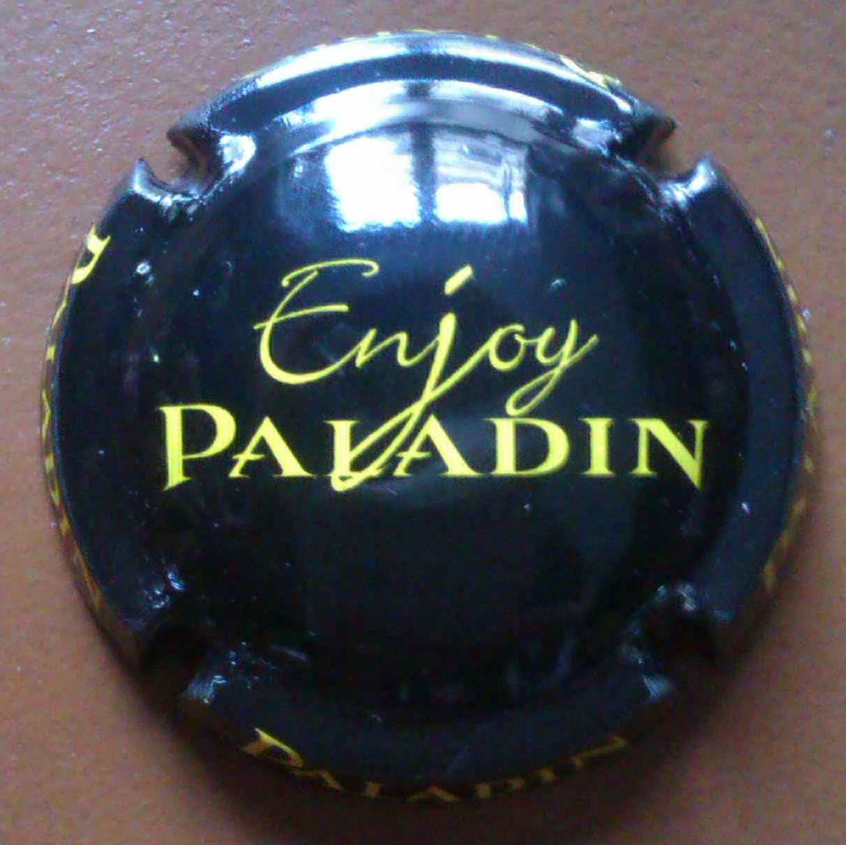 Capsule de spumante Paladin (Italie).